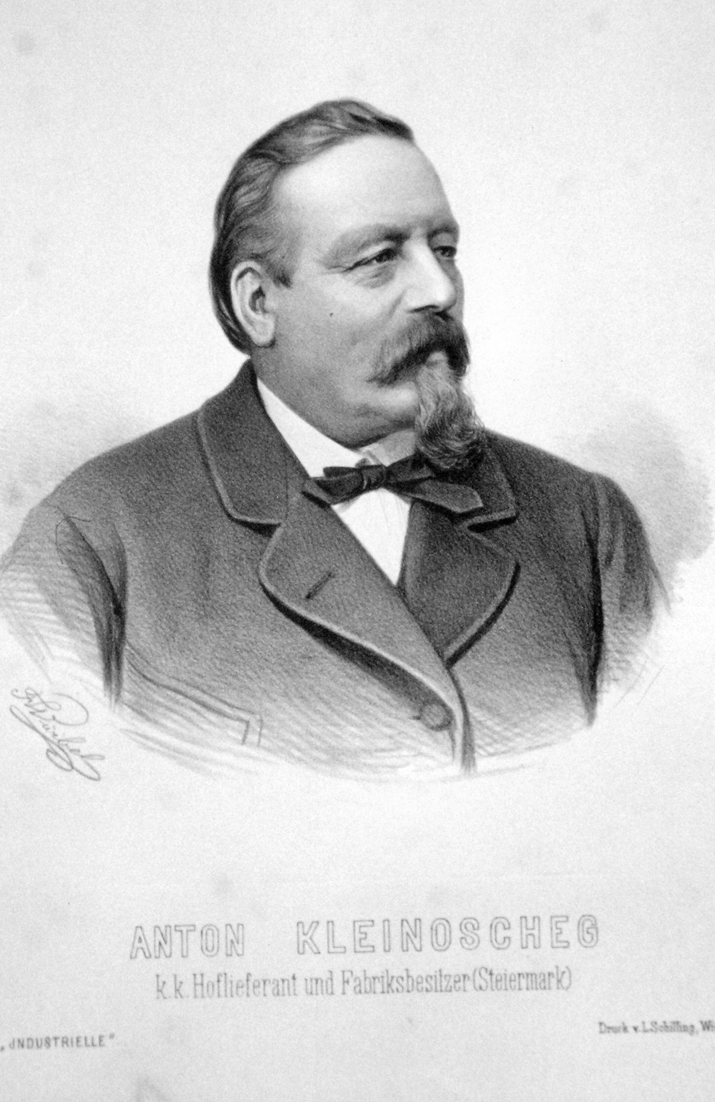 Lithographie von Anton Kleinoscheg, k.k. Hoflieferant und Fabriksbesitzer (Steiermark).